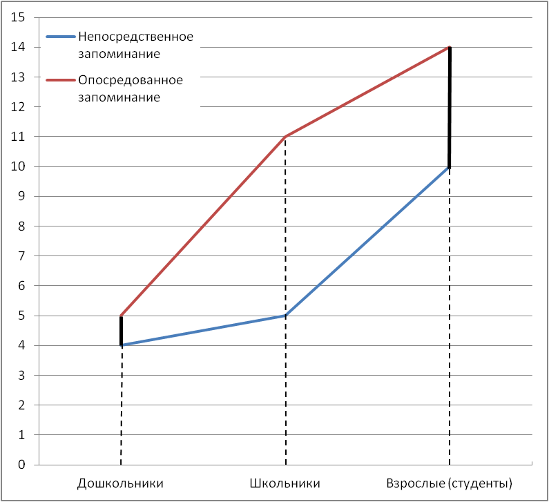 Параллелограмм развития. По оси абсцисс- возраст испытуемых. По оси ординат - число правильно воспроизведённых слов. Перерисовано по данным исследования А.Н. Леонтьева. Источник: Леонтьев А.Н. Проблемы развития психики. - М.: Издательство Академии педагогических наук РСФСР, 1958.